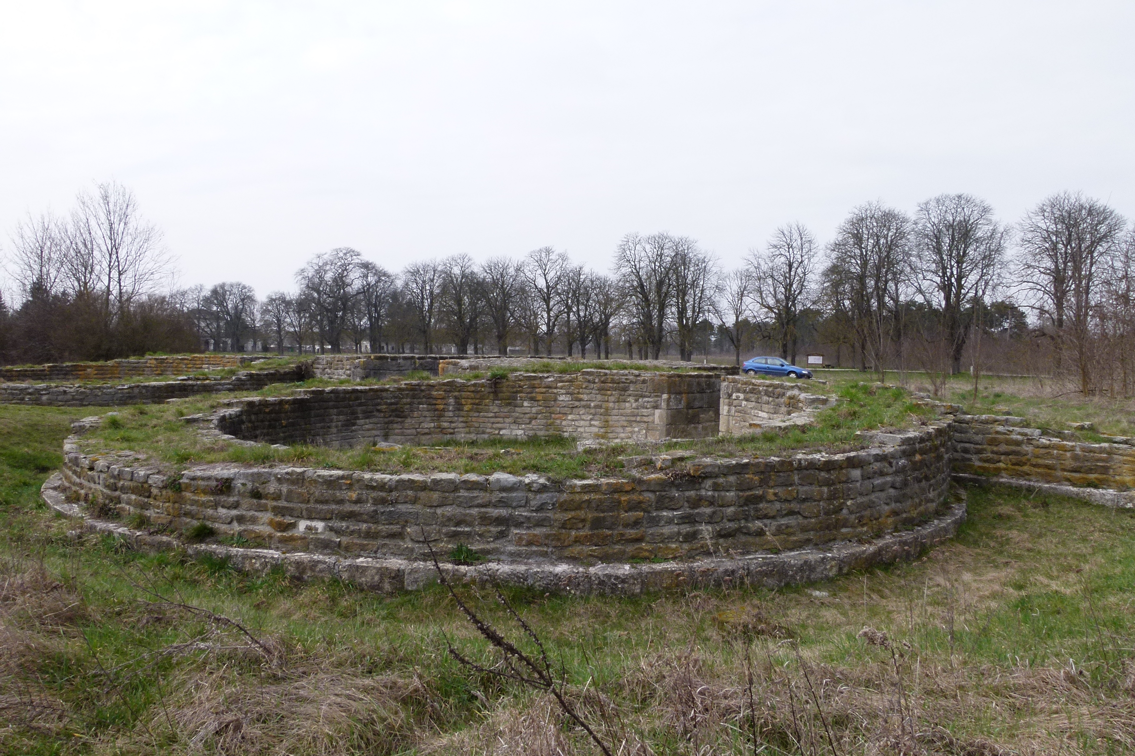 Fenékpuszta, romterület